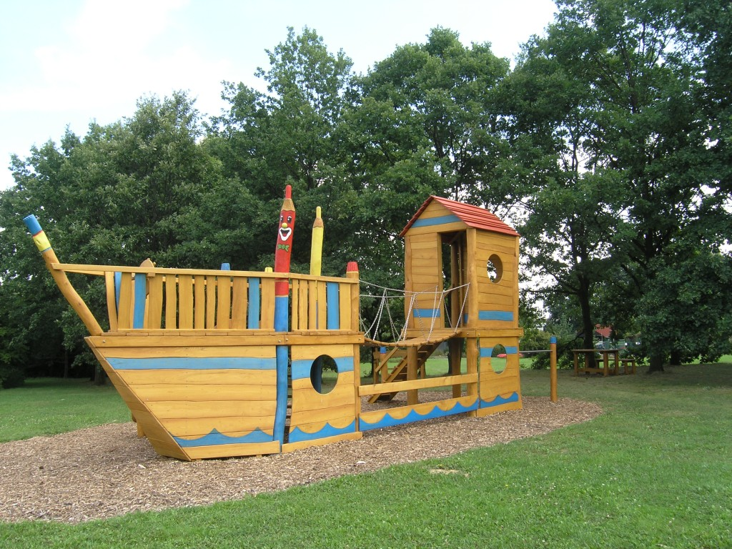 Pirátská loď Pinta je součástí dětského hřiště na Dendrologické zahradě